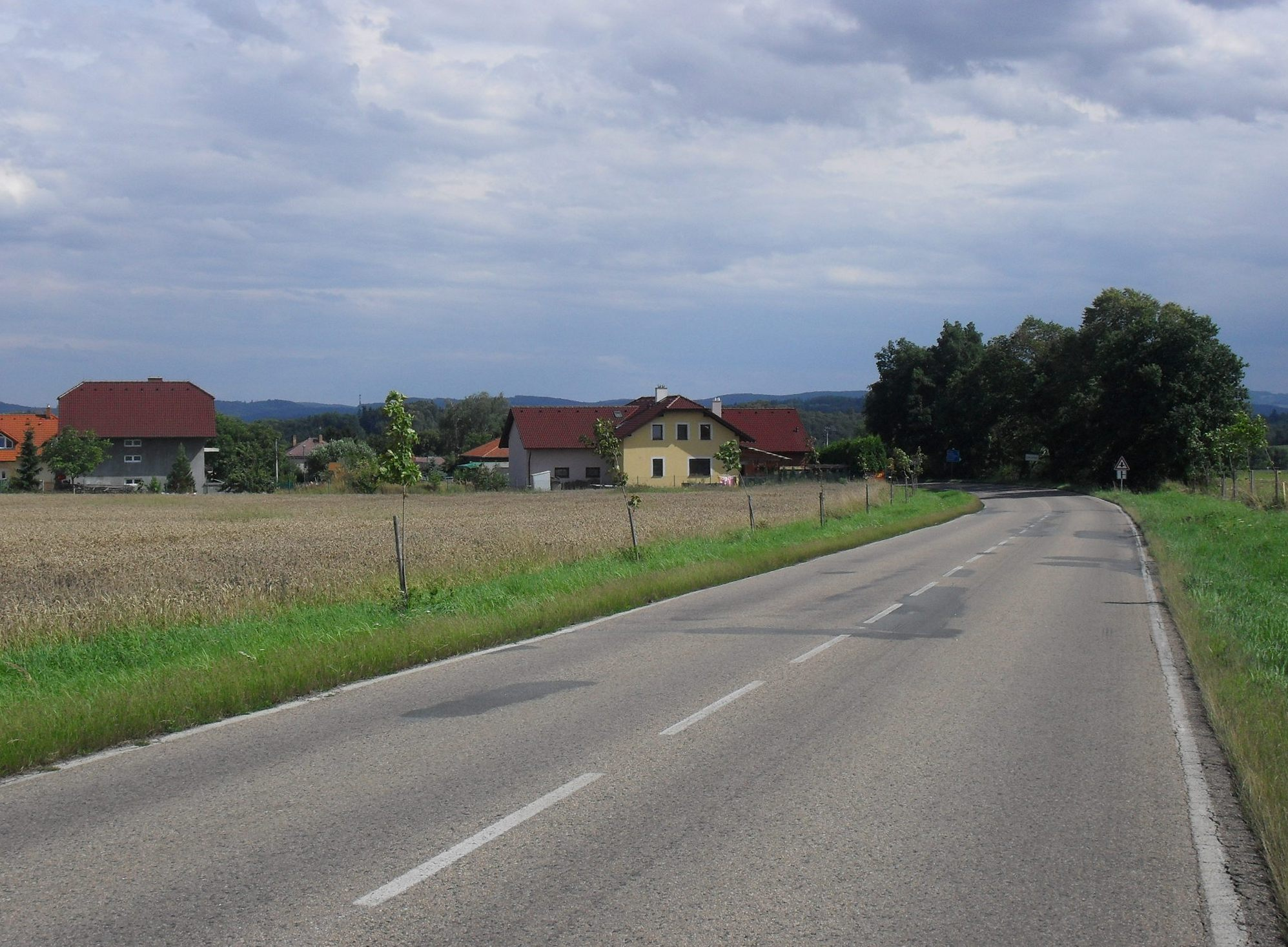 Pohled na obec Chlístov